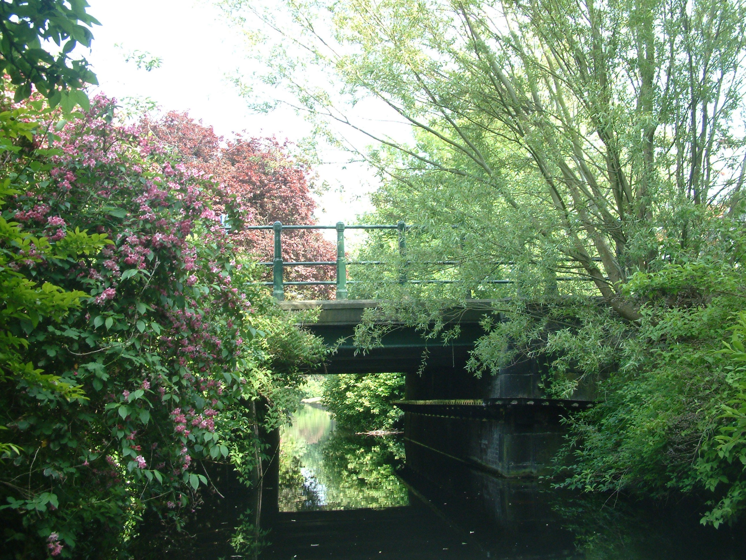 Bridges in The Hague as mentioned in the filename.